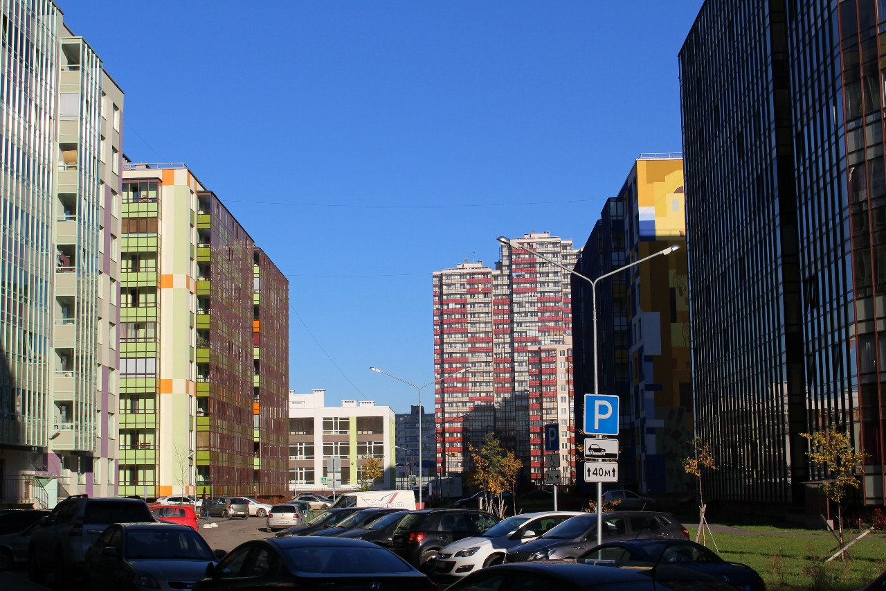 Улочки в квартале "Семь столиц" в Кудрово